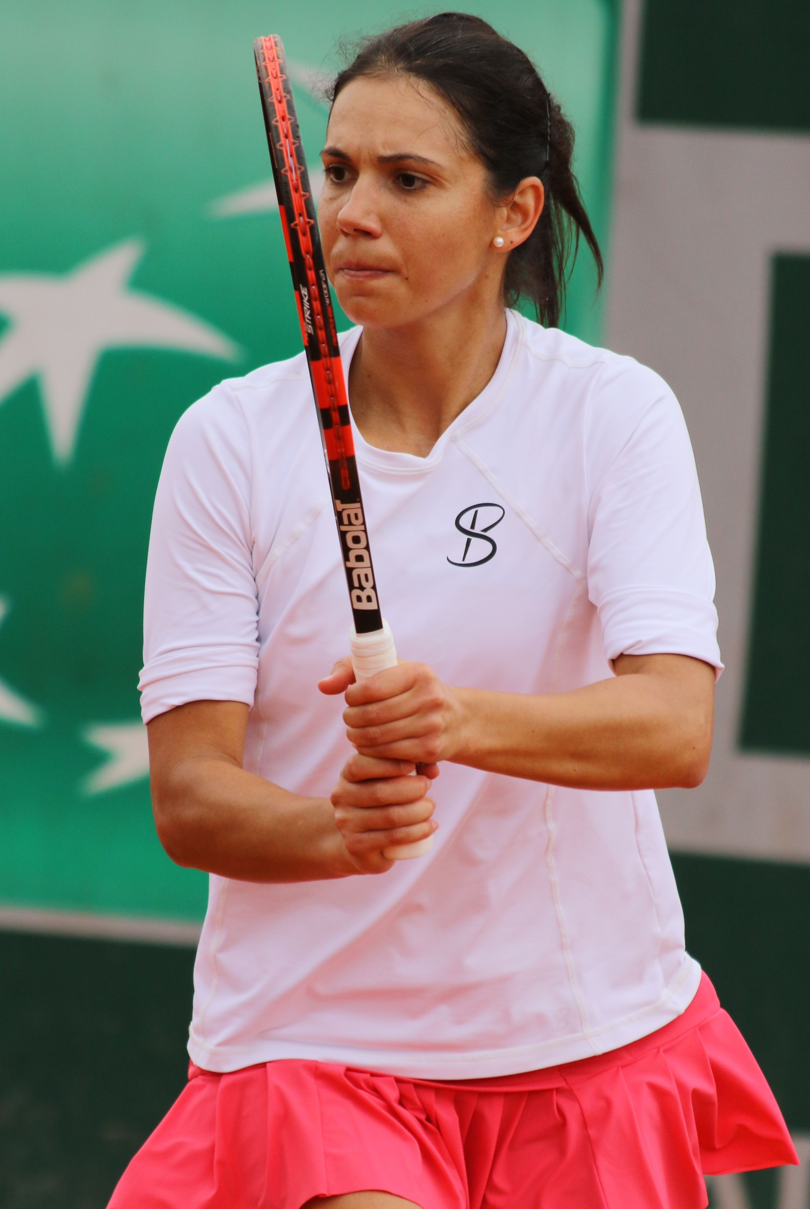 Olaru RG19 (59)